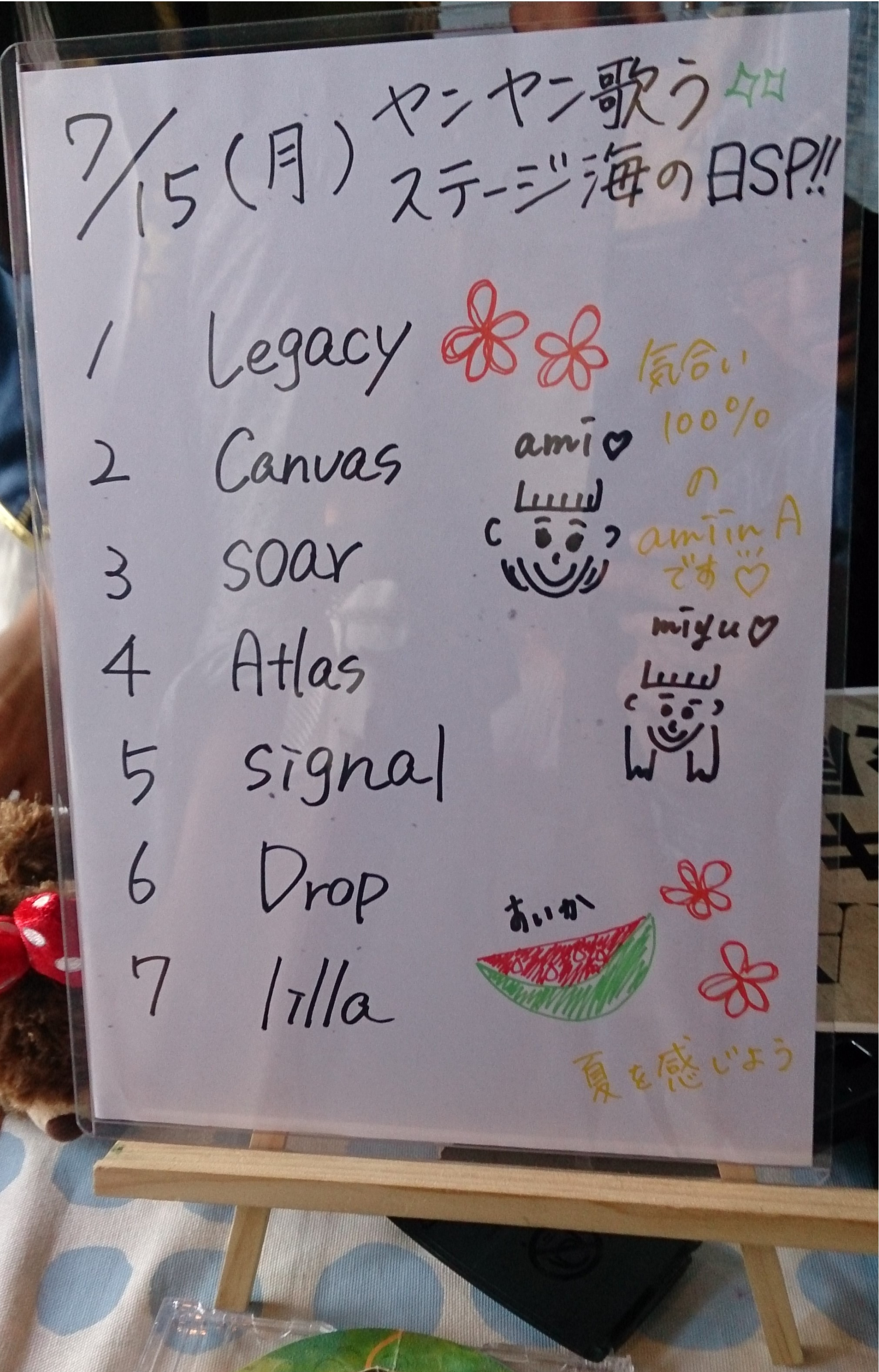 amiinAセトリボード(20160718(1))